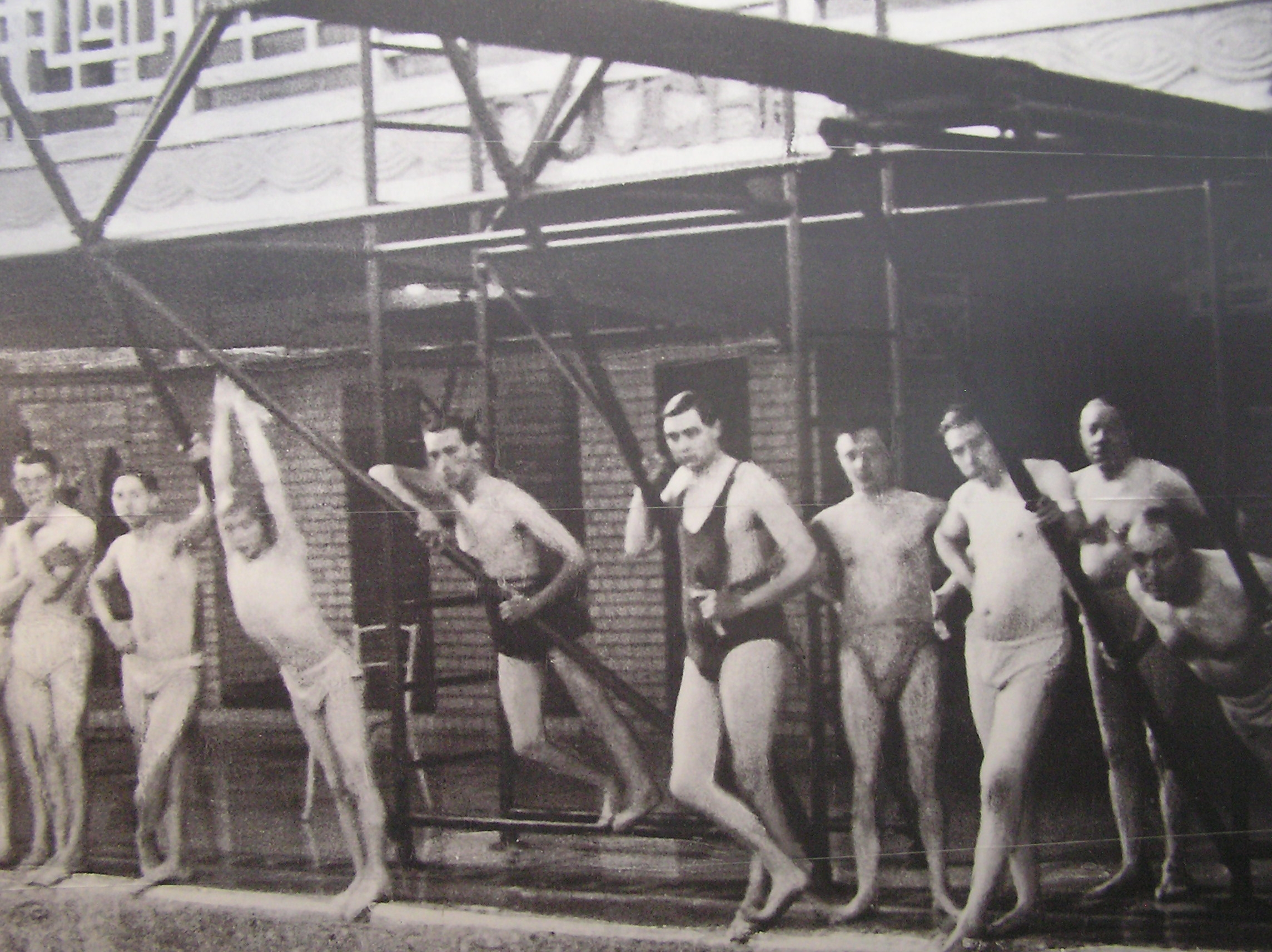 Foto eines im Musée d'Art et d'Industrie in Roubaix ausgestellten Aufnahme des öffentlichen Bades.